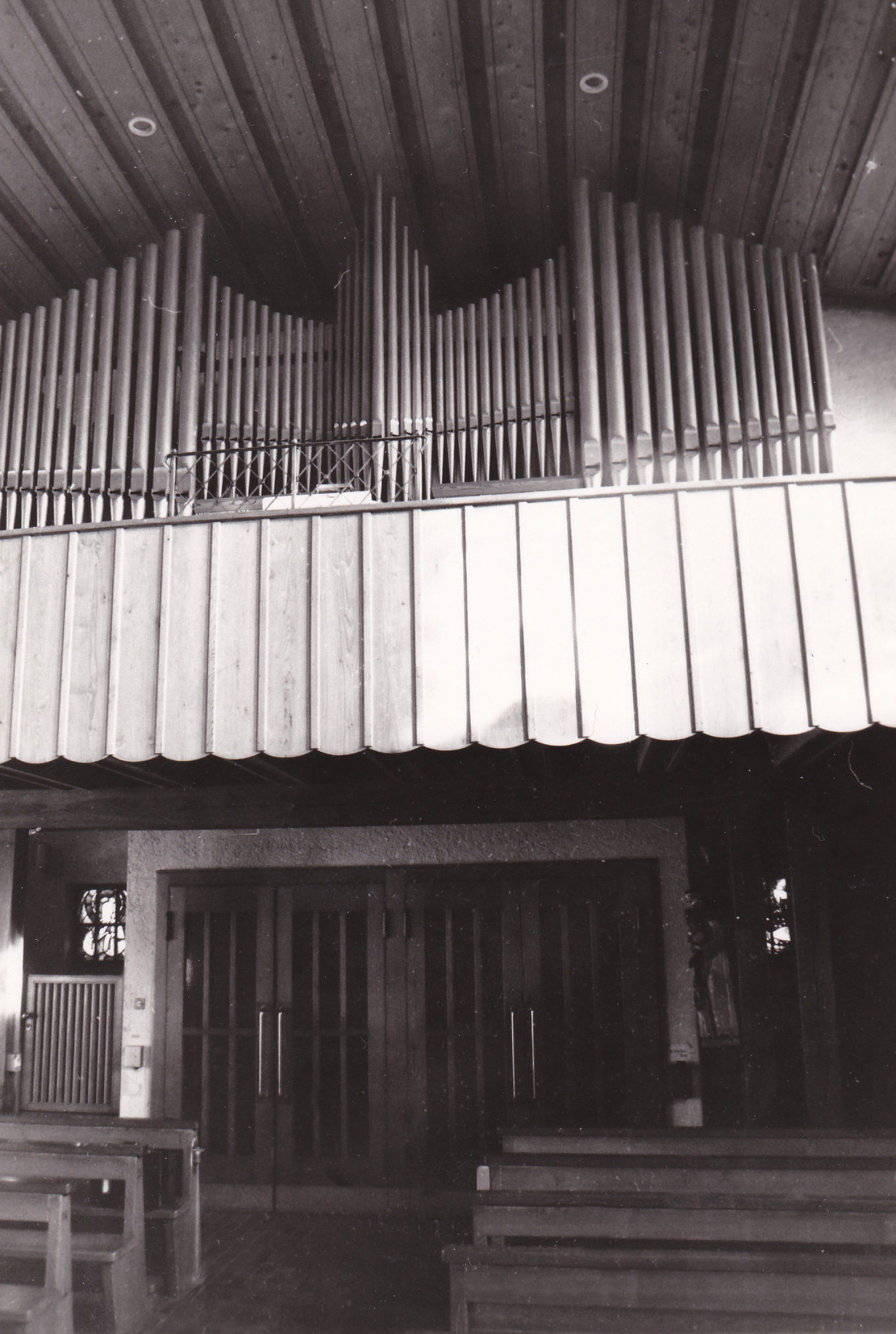 Römisch-katholische Pfarrkirche Heilig Geist von 1940, Späth-Orgel von 1954